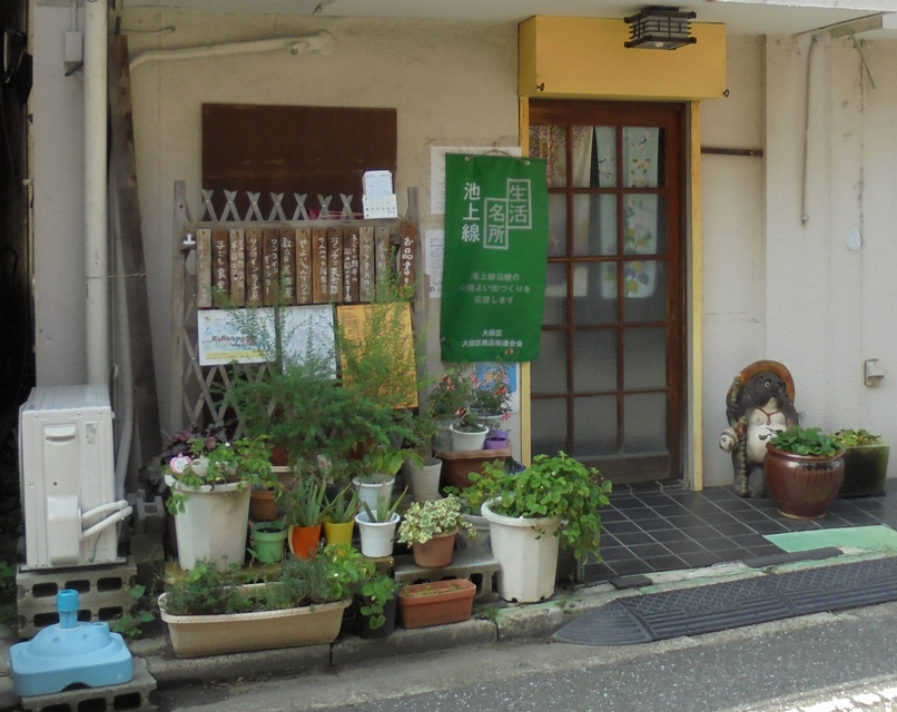 Kimagure Yaoya Dandan, Tokyo, Japan